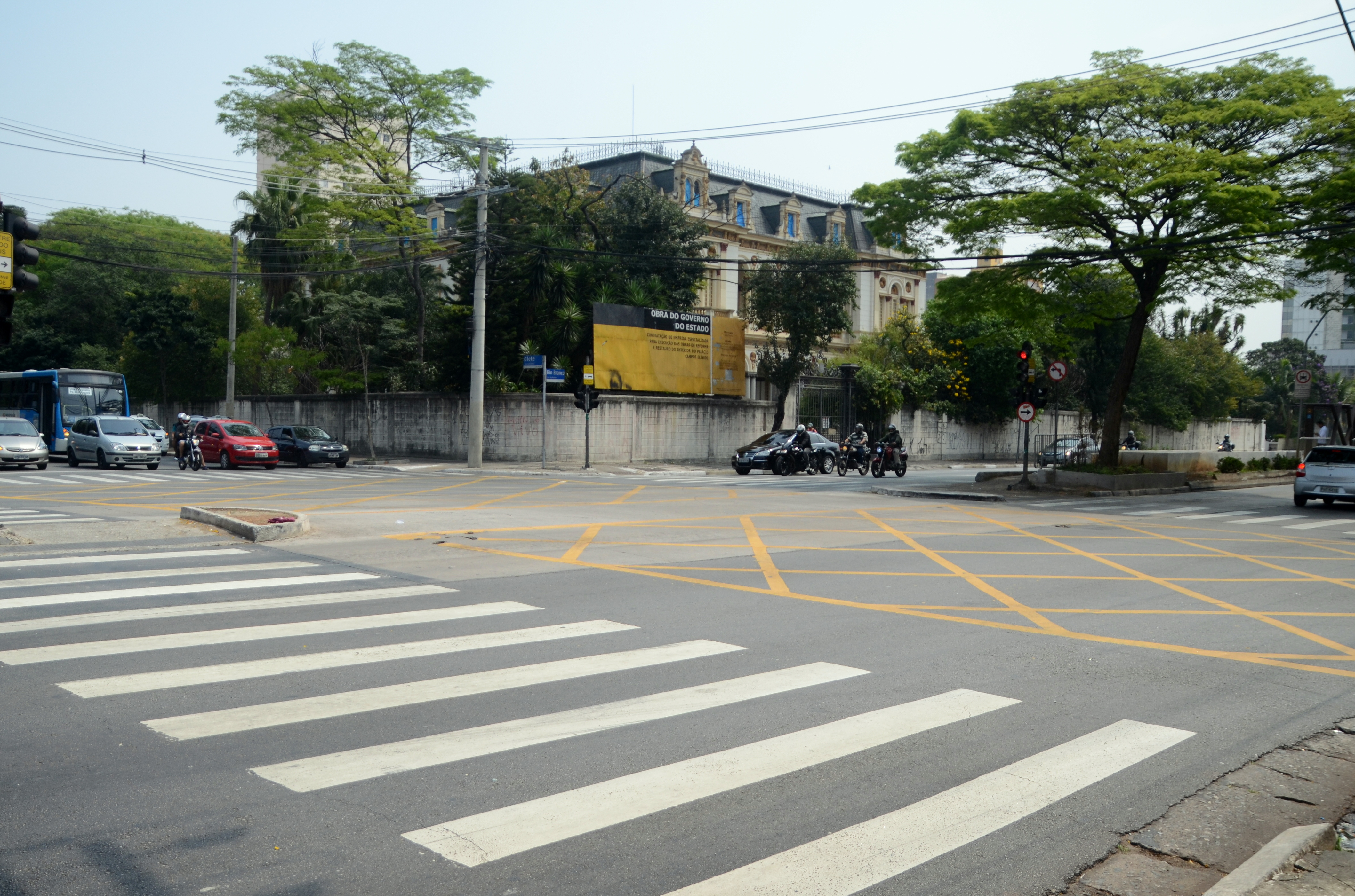 CRUZAMENTO PALÁCIO DOS CAMPOS ELÍSIOS ABERTO